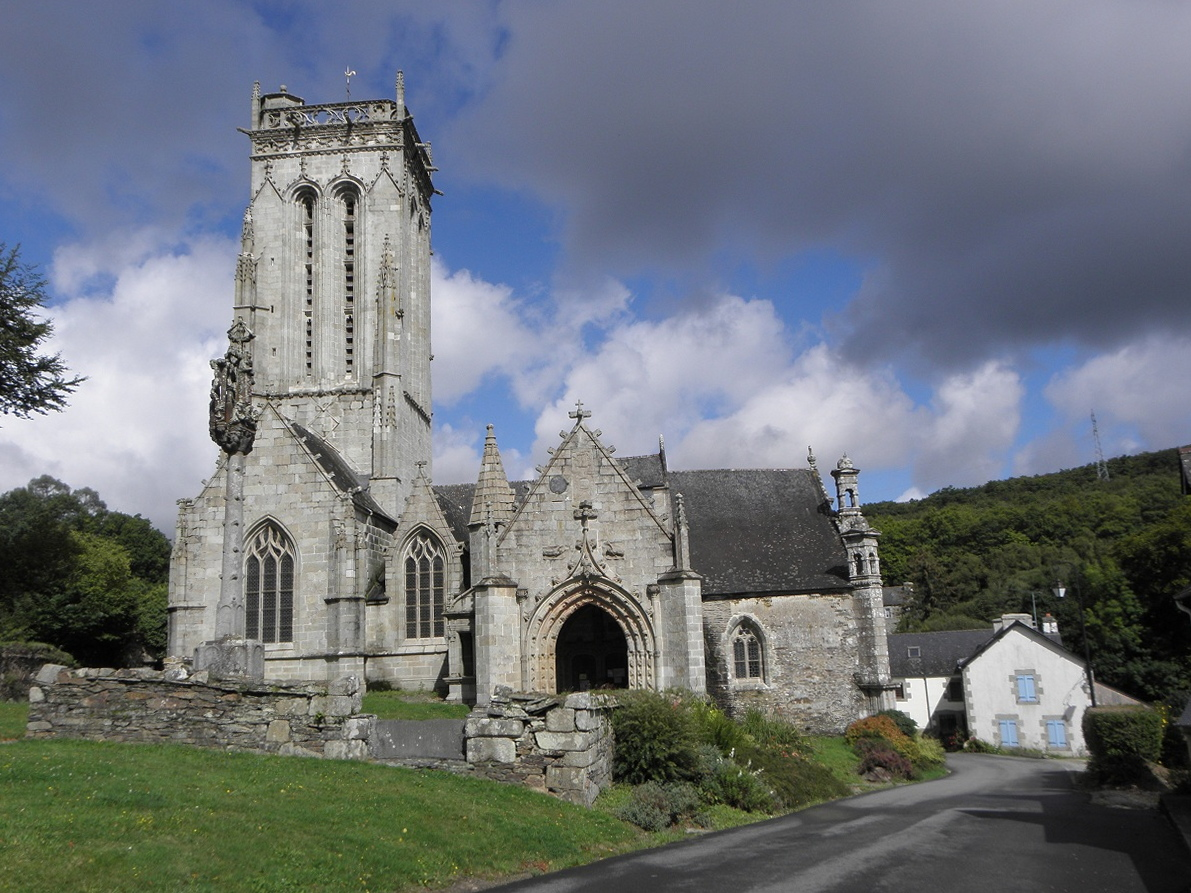 Vue méridionale de la chapelle de Saint-Herbot (29). .